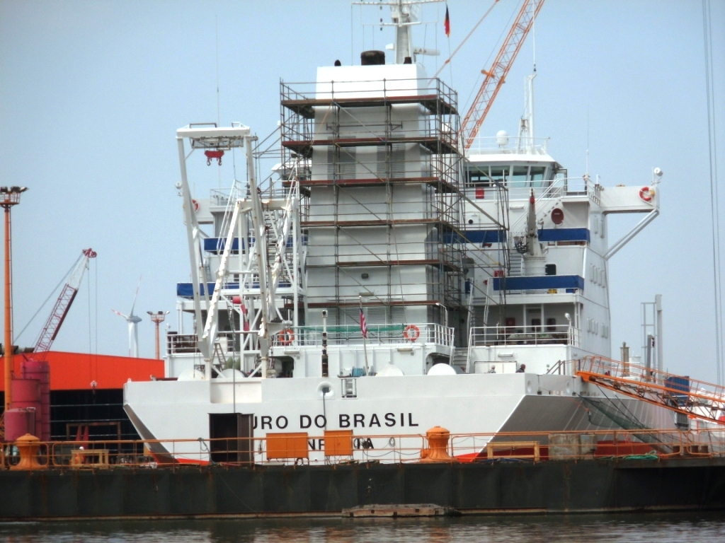 Blick auf das Docktor von Dock II, Trockendock der Lloydwerft. darin liegt der Orangensaftkonzentrattanker "Ouro do Brasil"